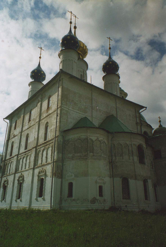 Spaso_Jakovlevsky_Monastery. Zachatievsky_Sobor (XVII c.)